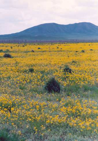 Tal in den Ulytau-Bergen